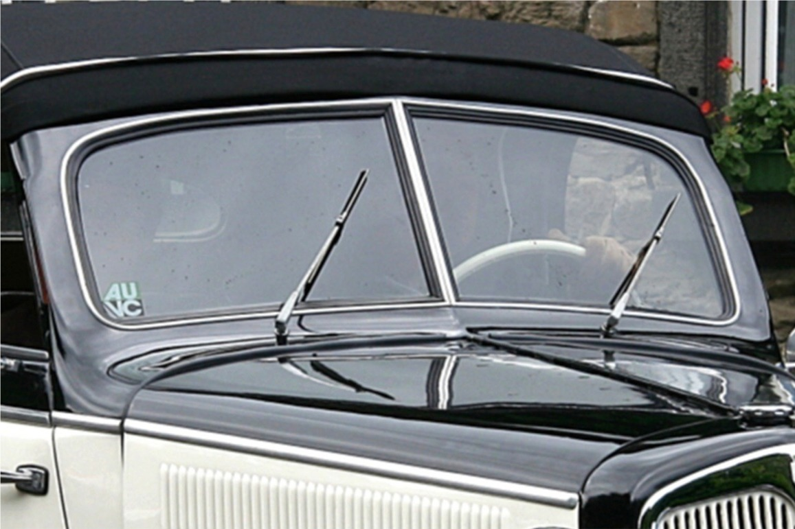 Stehende Scheibenwischer an einem IFA Baujahr 1954